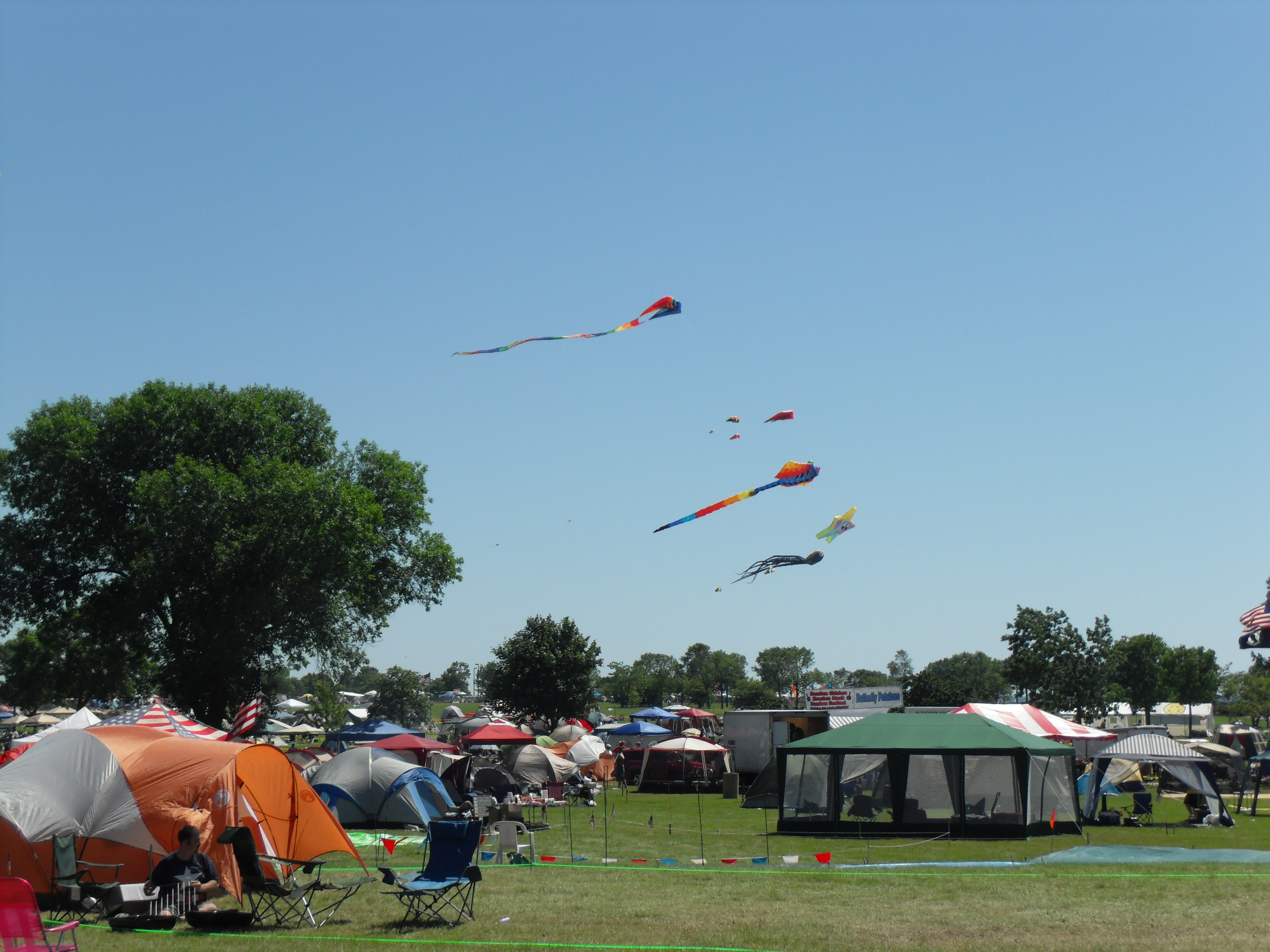 Гулянье в День Независимости на берегу озера Мичиган